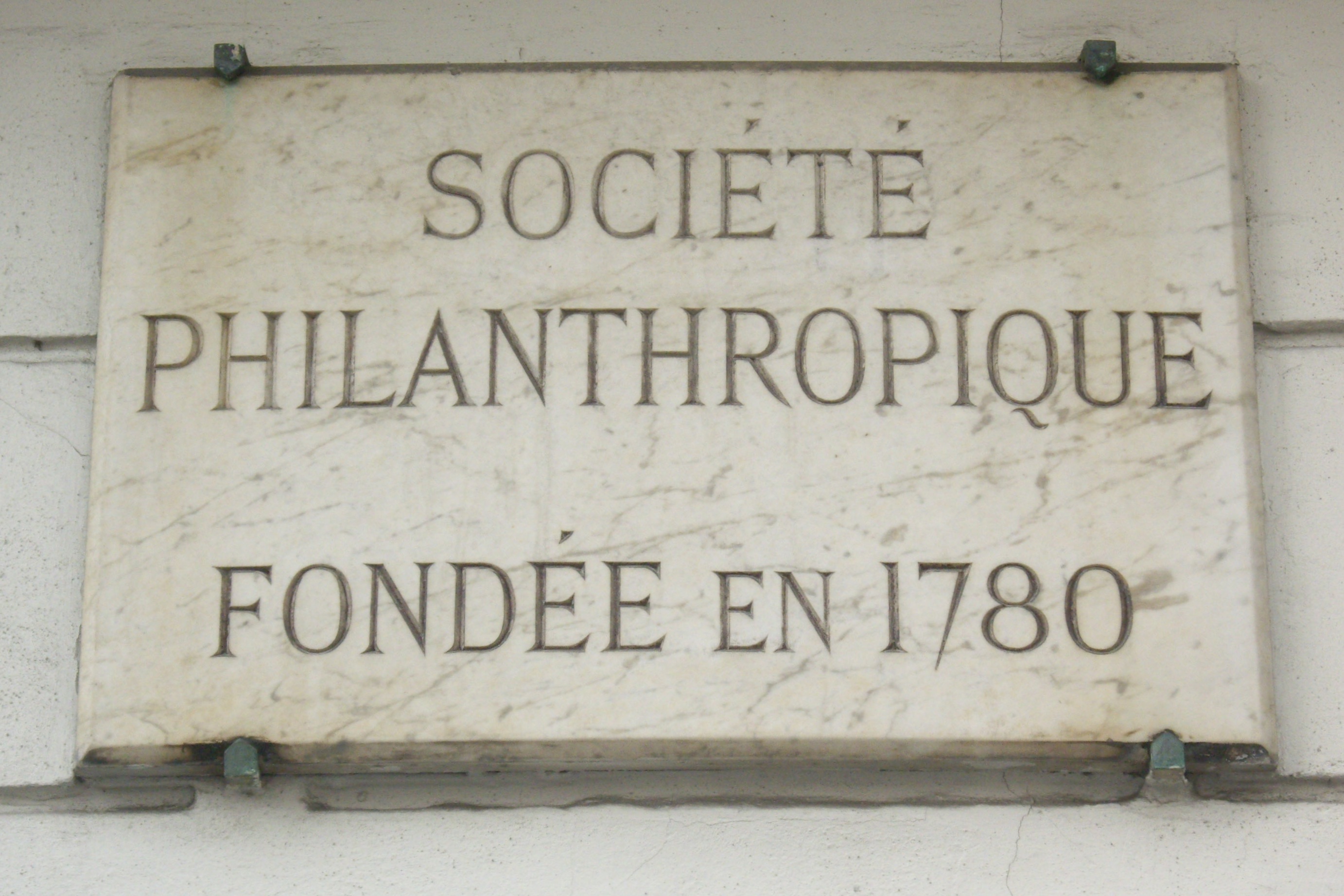 Plaque de la Société philanthropique, 45 rue Jeanne-d'Arc, Paris 13e.